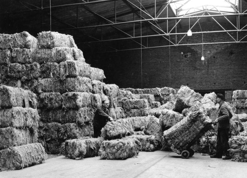 2.11.1953 Vereinigte Jute-Spinnereien und Webereien A.G., Hamburg, Werk Beuel Rohjutelager (Produkte aus Indien und Pakistan)